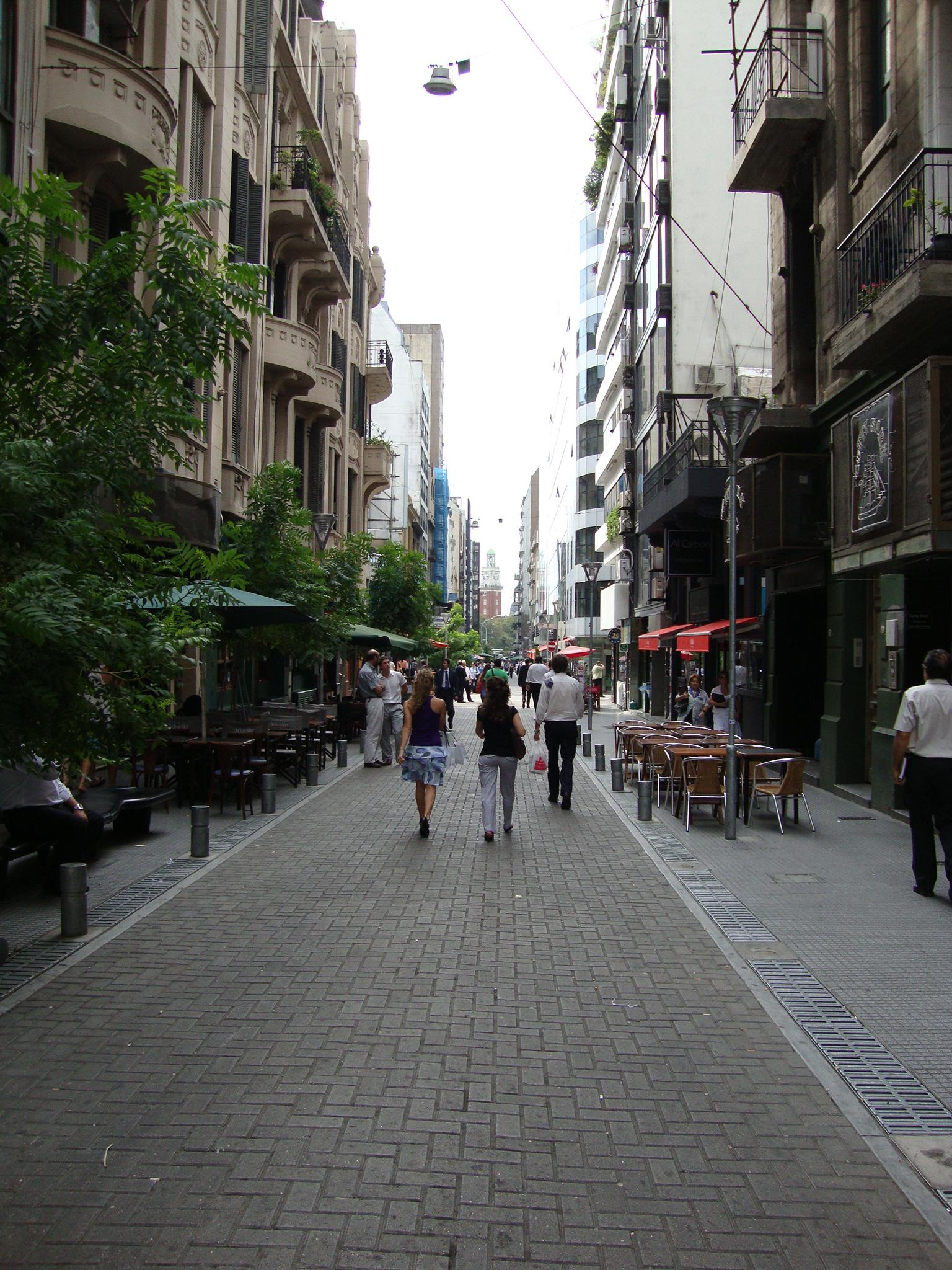 La calle Reconquista, vista hacia el norte desde la esquina con la calle Paraguay. Al fondo, se aprecia la Torre Monumental. Buenos Aires, Argentina.